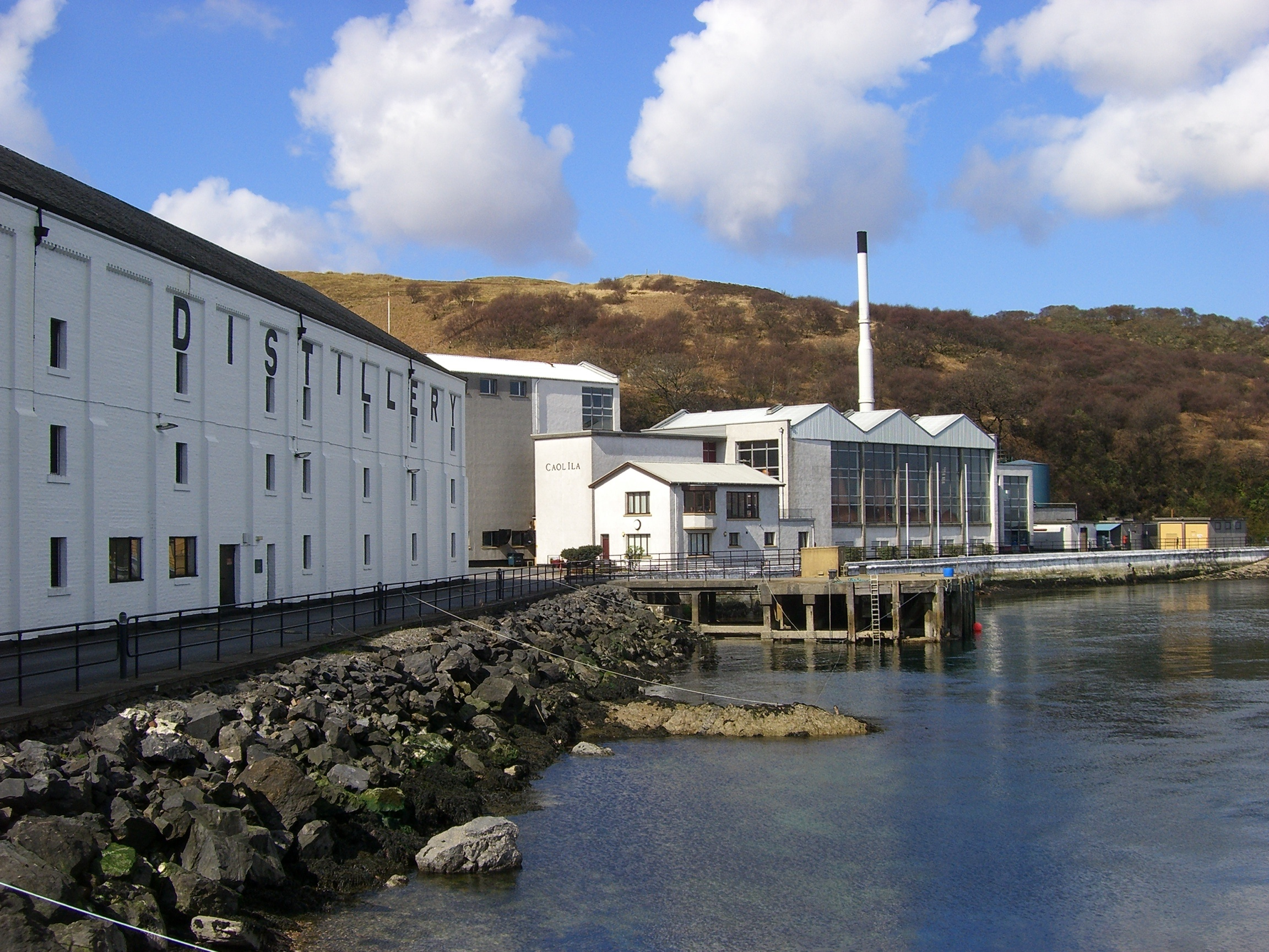 distillerie Caol Ila, Islay, Ecosse